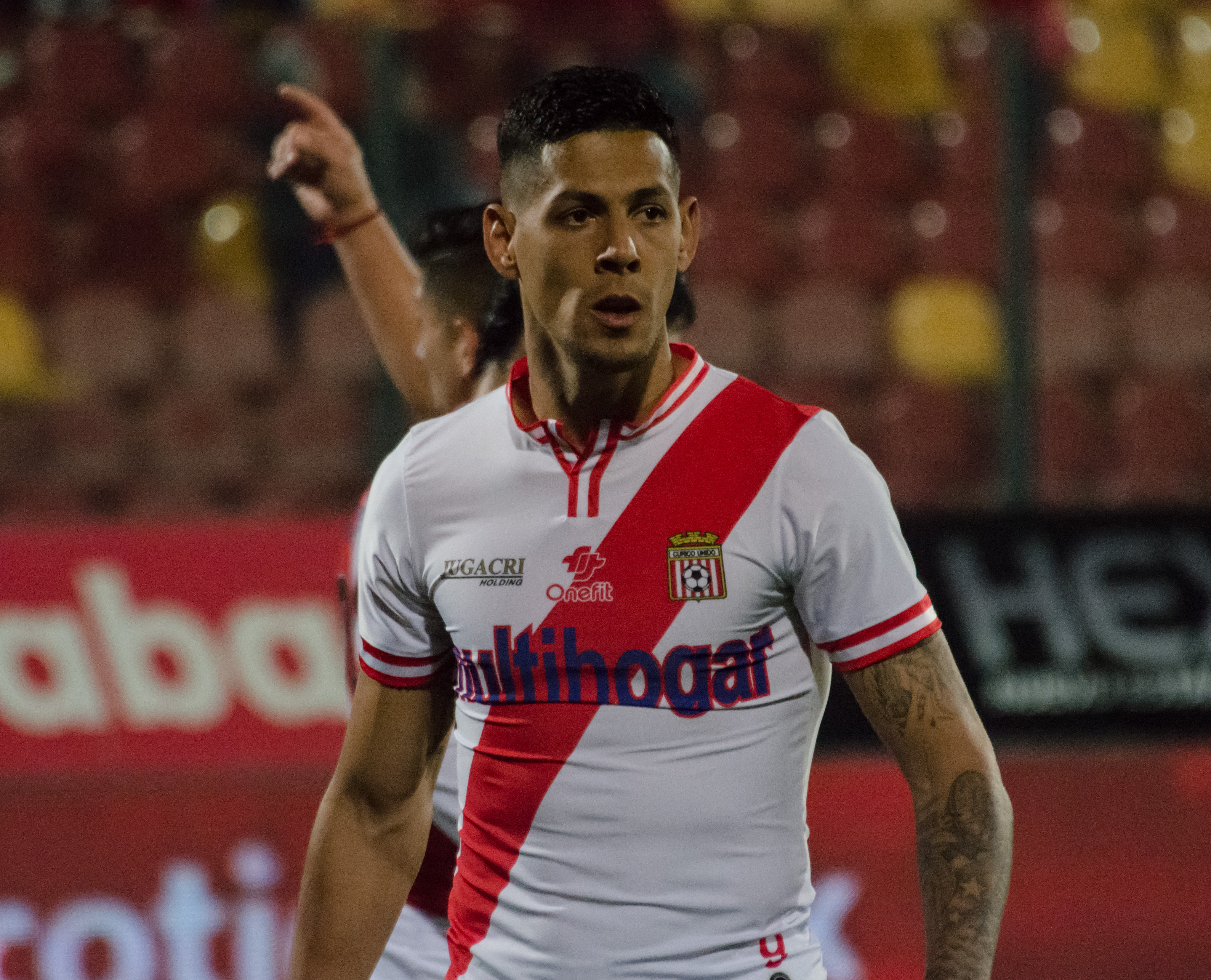 Mauro Quiroga, Unión Española v Curicó Unido, Estadio Santa Laura, Independencia, Santiago, Chile